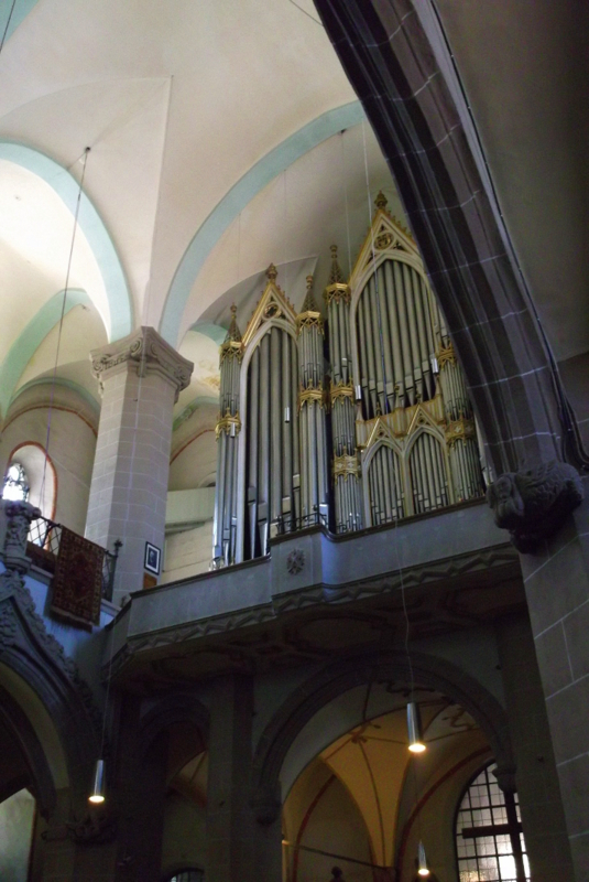 Braszów, Czarny Kościół